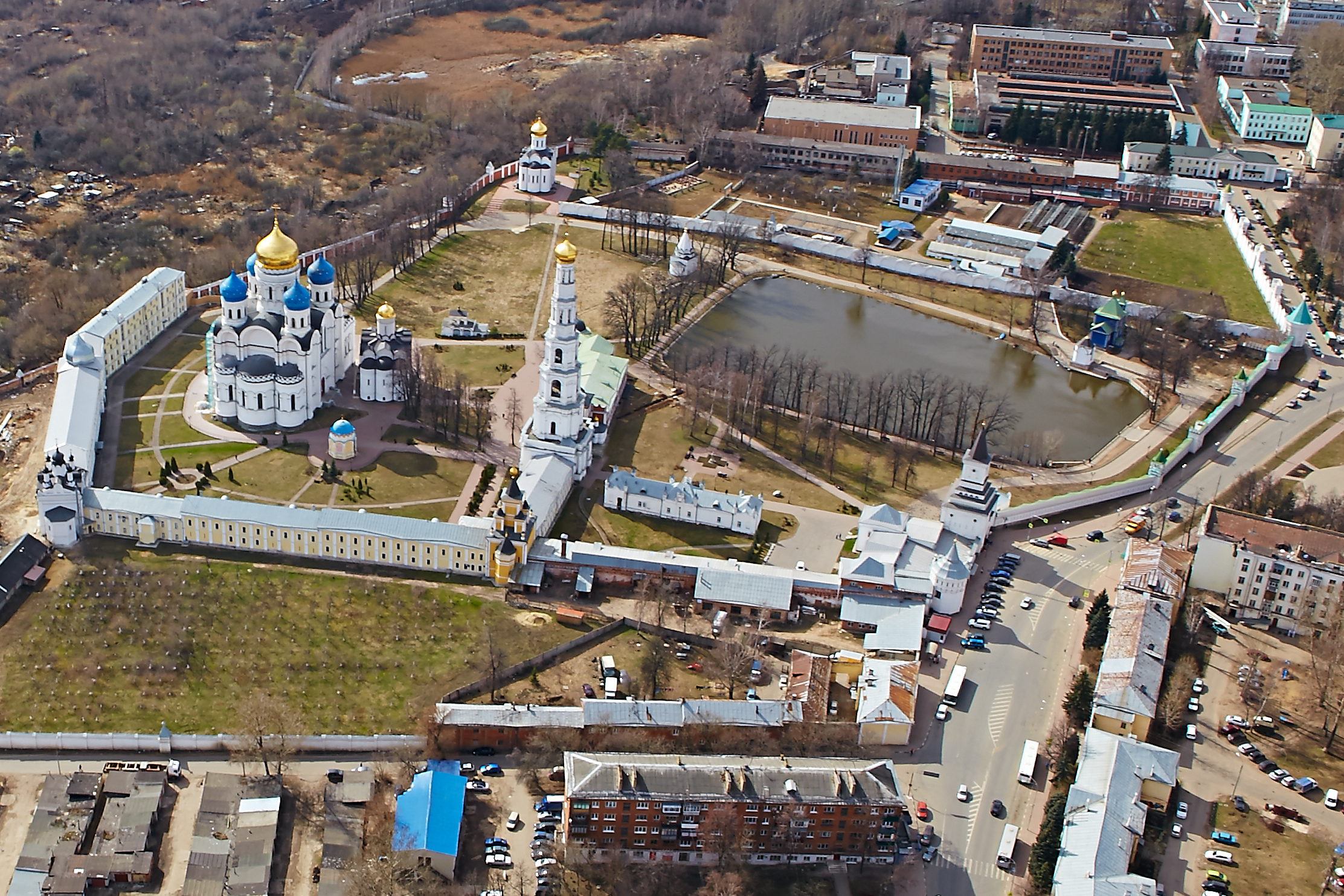 Николо-Угрешский монастырь (Москва и Московская область, Дзержинский, площадь Святителя Николая, 1)